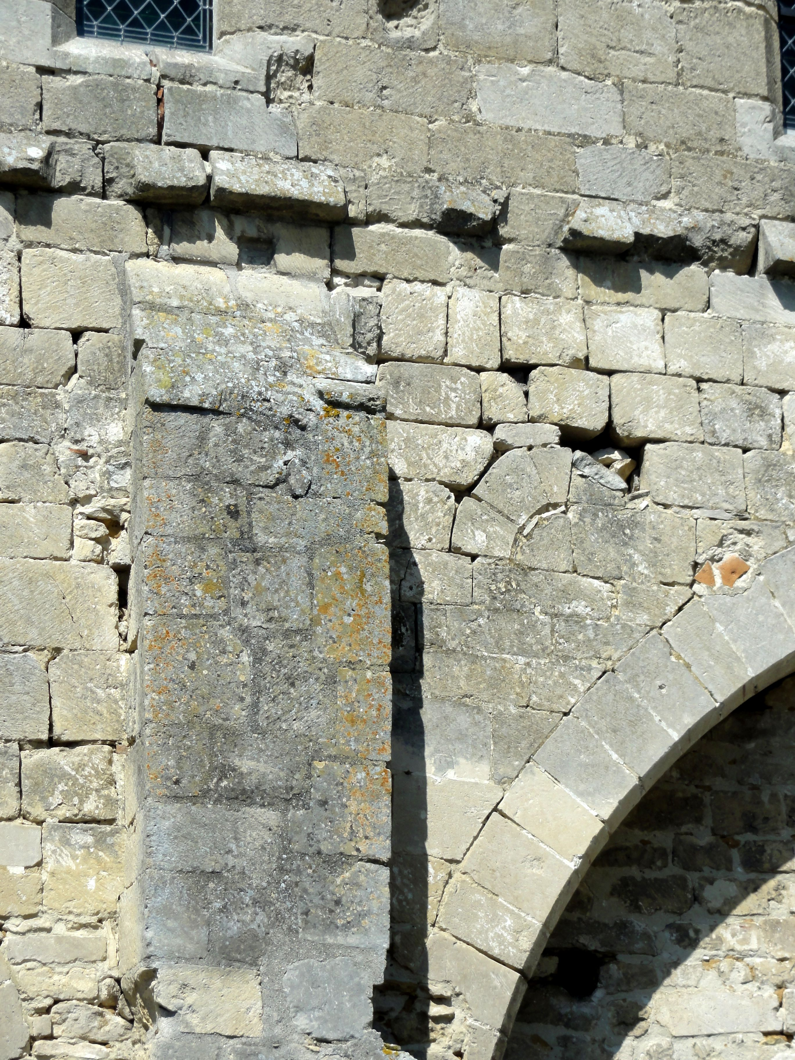 Nef, fenêtre bouchée de l'ancienne nef, côté sud.